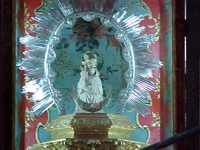 Virgen de la Peña, Vega del Río Palmas, Betancuria, Fuerteventura